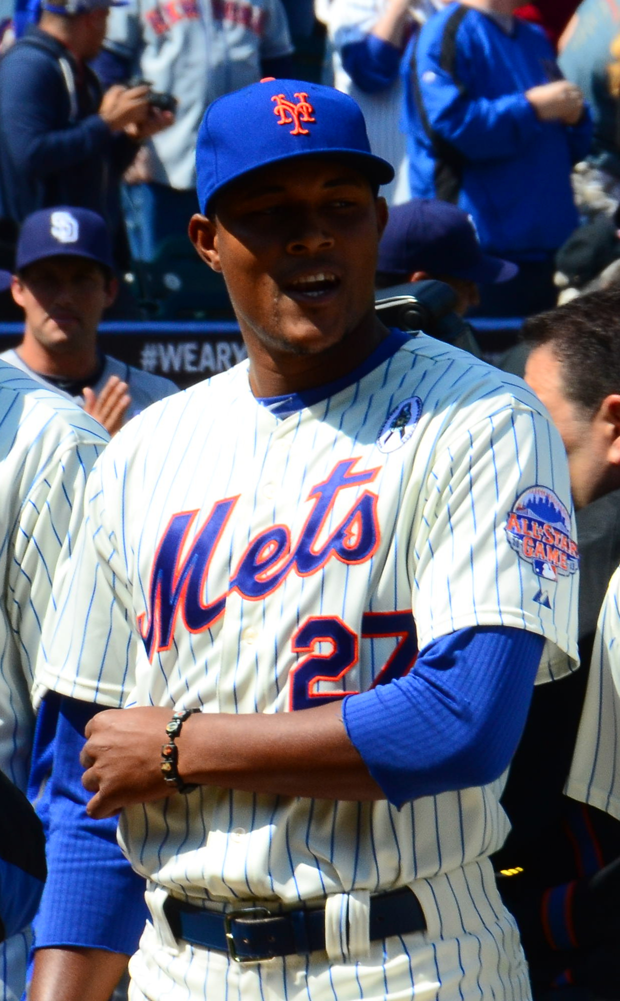 Jeurys Familia